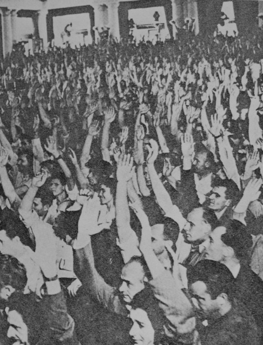 Srpskohrvatski / српскохрватски: Delegati daju podrsku rukovodstvu KPJ na Petom Kongresu, povodom rezolucije Informbiroa.